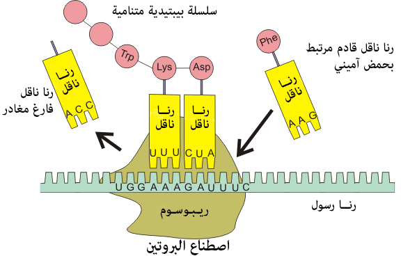 توضيح لعميلة الترجمة الوراثية.